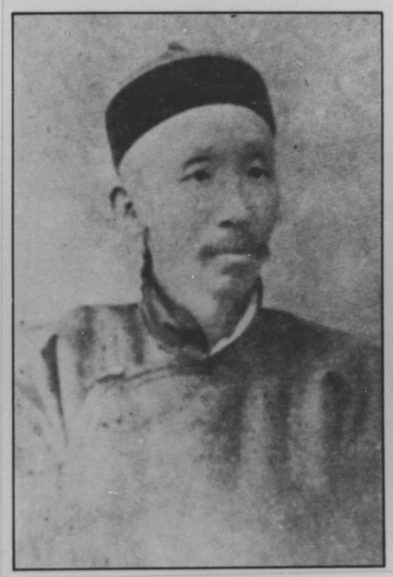 Ma Jianzhong